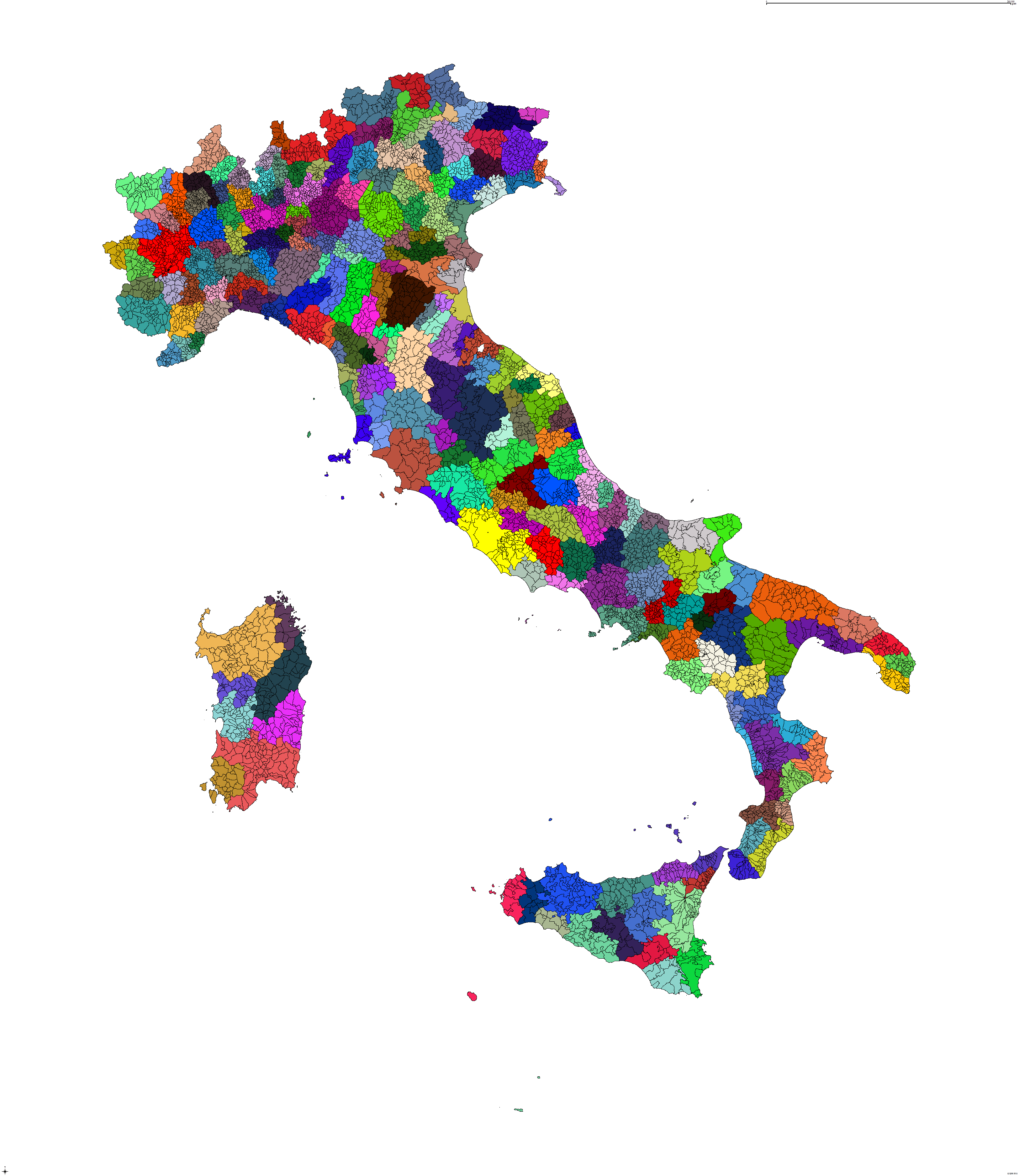 Mappa dei distretti telefonici presenti in Italia